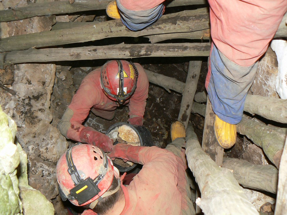 Cieľom prolongačných prác v jaskyniach Horného vrchu je objaviť ich pokračovanie a potvrdiť ich predpokladaný vývoj.